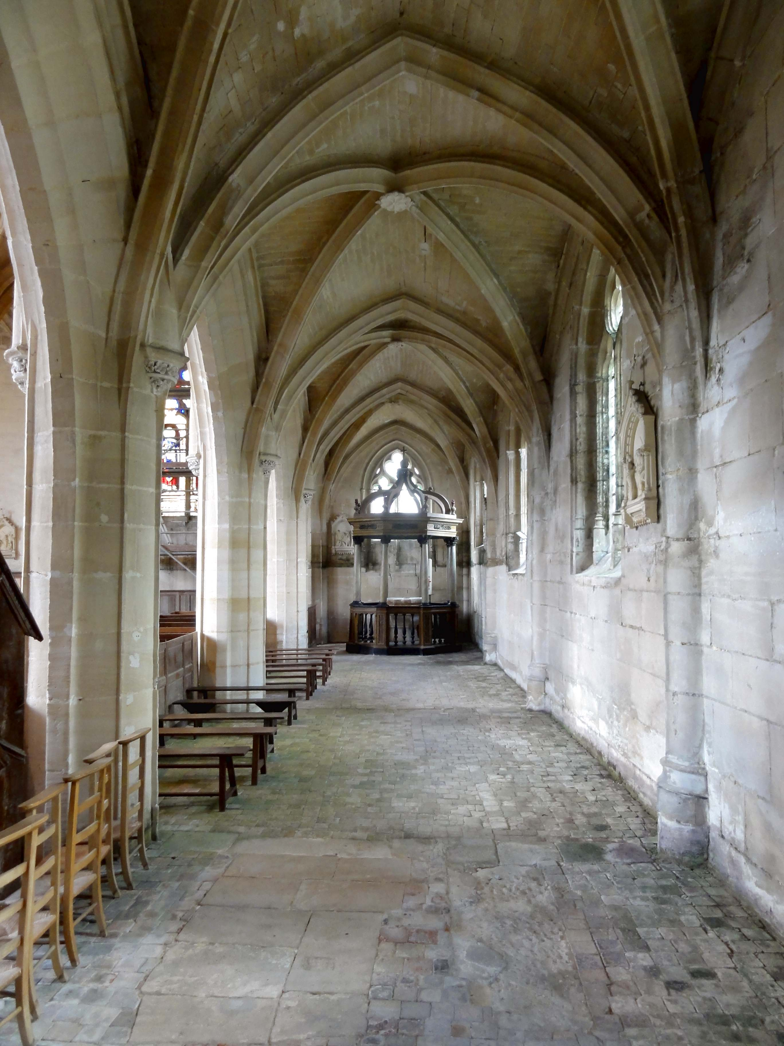 Intérieur de l'église - voir le titre du fichier.